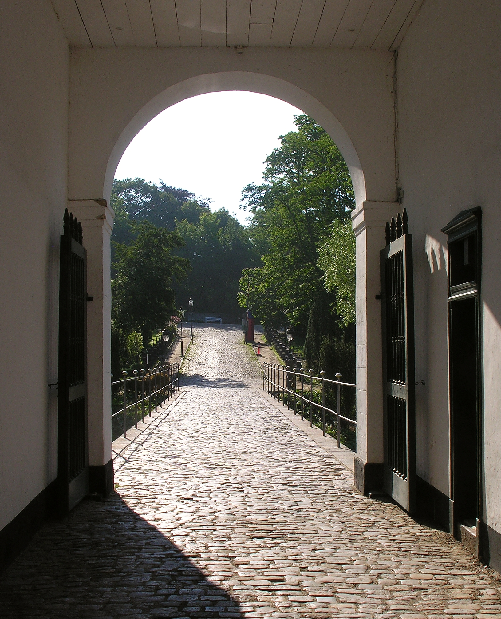 File:Kulturdenkmal 4.12 Brücke zum Vorplatz vom Torhaus Schloss Glücksburg Schleswig-Holstein Foto 2012 Wolfgang Pehlemann Steinberg/Ostsee DSCN0209